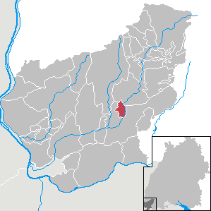 Hausen im Wiesental, Landkreis Lörrach, Baden-Württemberg